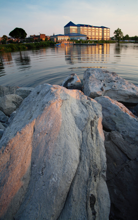 Ramada Inn, Geneva, NY